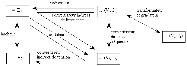 schéma représentant les différentes conversions de l'énergie possible et les convertisseurs de l'électronique de puissance correspondants Utilisateur:P.loos